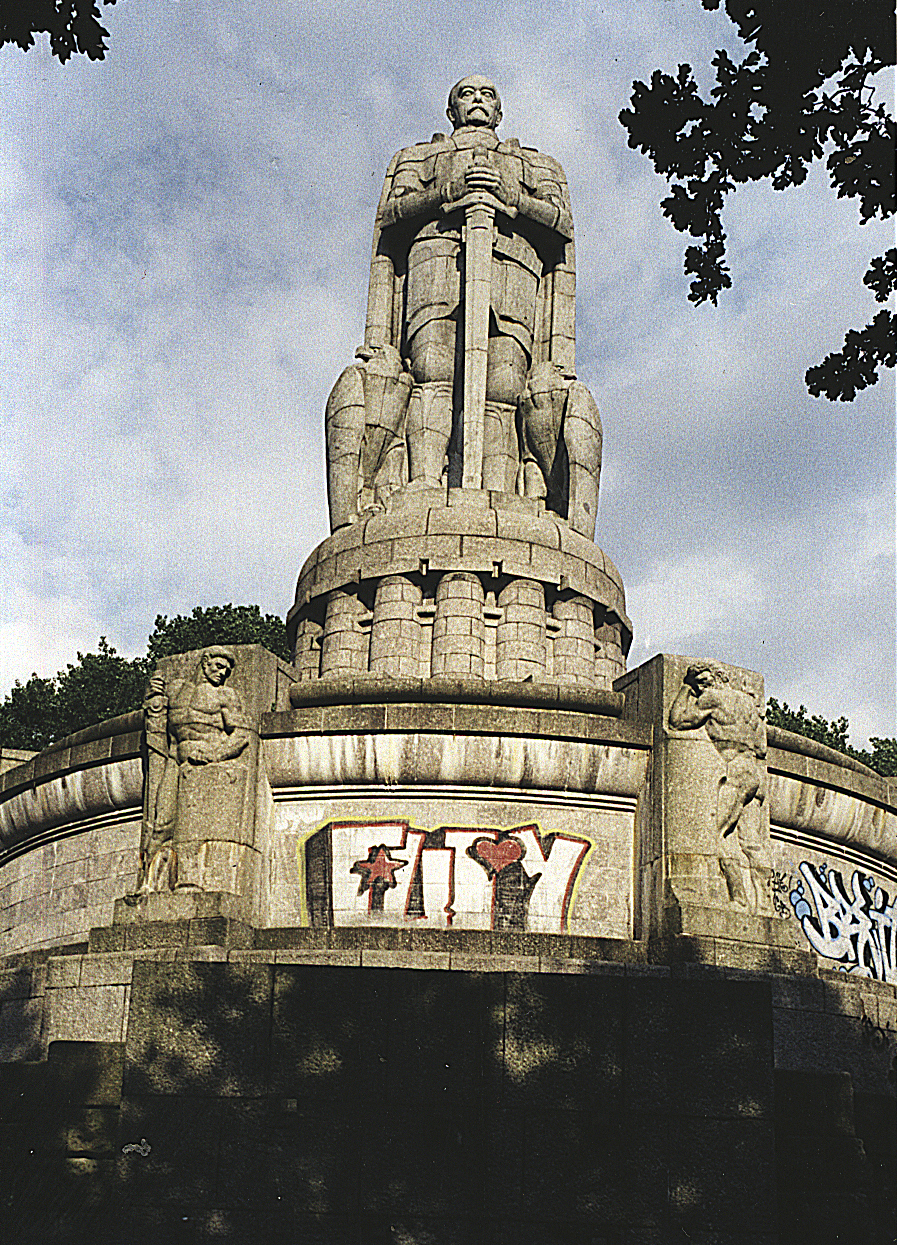 Бисмарк.Гамбург.